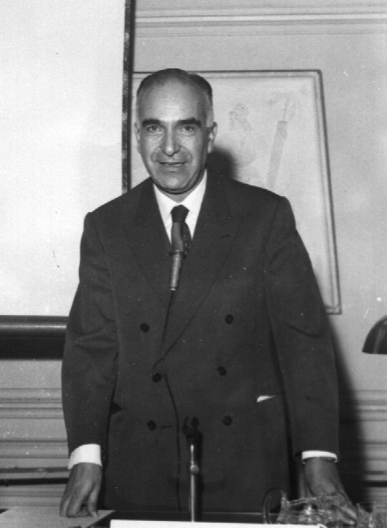 El Ingeniero Leon Halpern nació en Buenos Aires, el 16 de Febrero de 1910. Obtuvo los títulos de Electrotécnico en la Escuela Industrial de la Nación Otto Krause en 1931, de Agrimensor Nacional en la Universidad Nacional de La Plata en 1942 y de Ingeniero Geógrafo en la Universidad Nacional de Córdoba en el año 1951. Fue fundador del Instituto Industrial "Luis A. Huergo" en el año 1934, desempeñándose en el mismo como Rector y ejerciendo en su oportunidad la docencia en las asignaturas de Mecánica y Topografía. Falleció en esta Capital, el 22 de Septiembre de 1984.